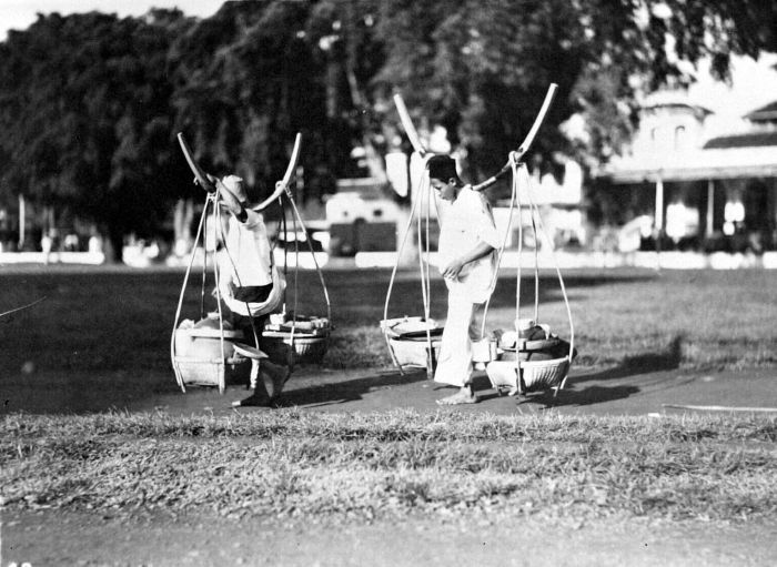 Repronegatief. Madurese verkopers in Oost-Java